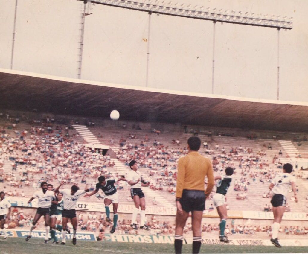 Ernesto Chagas em campo, Estádio Serra Dourada, Goiás x Goiânia.